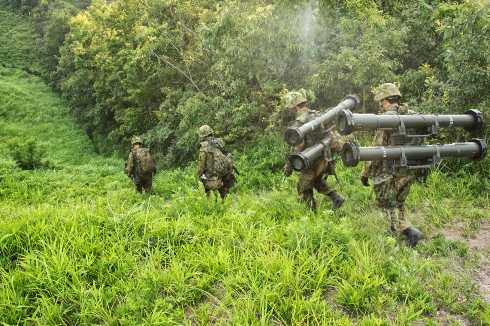 ８７式対戦車誘導弾（第４０戦闘団訓練検閲・第４０普通科連隊）